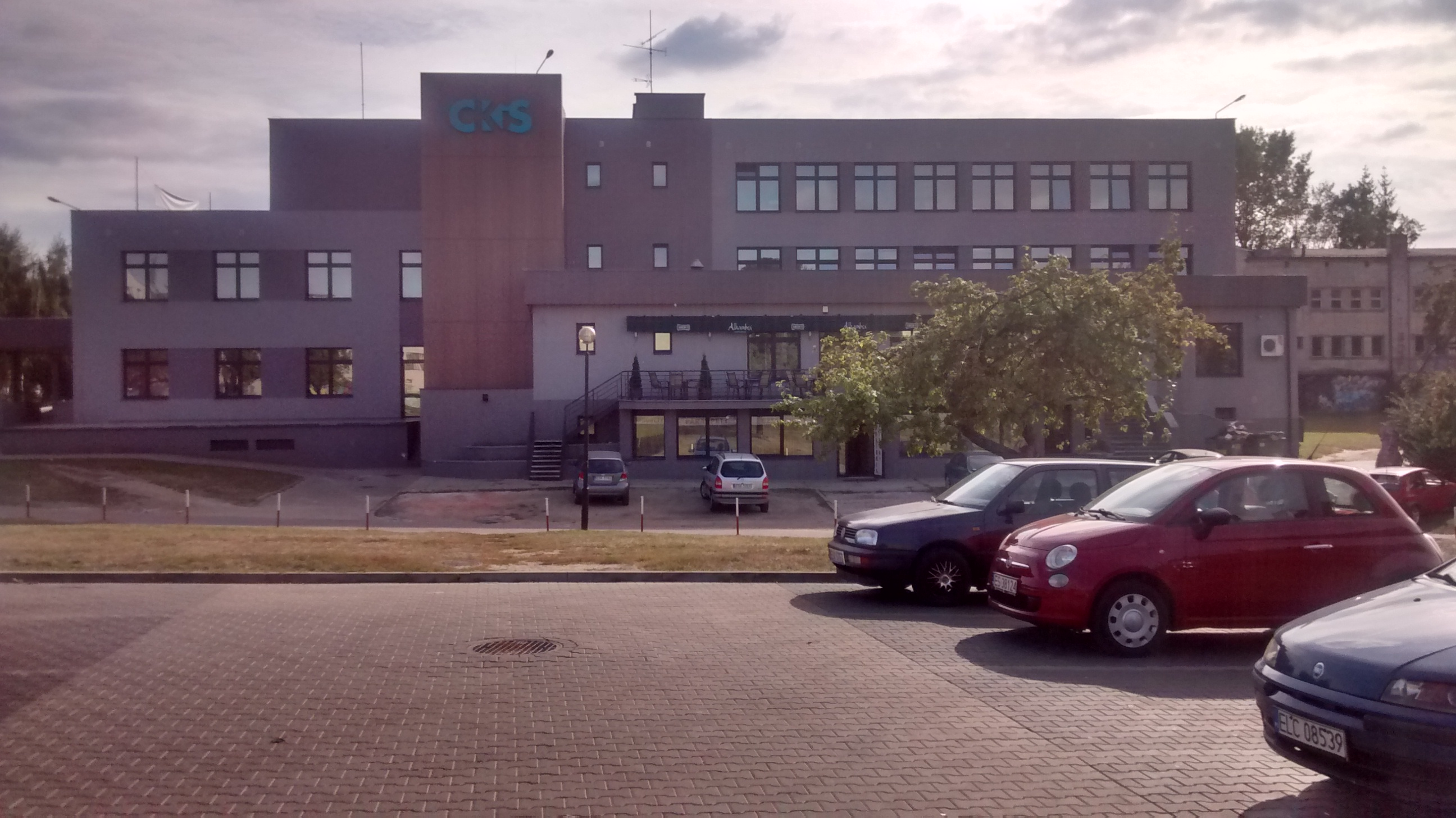 Budynek Centrum Kultury i Sztuki